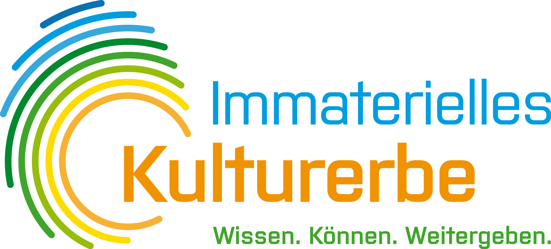 Logo "Immaterielles Kulturerbe - Wissen.Können.Weitergeben." der Deutschen UNESCO-Kommission e.V.